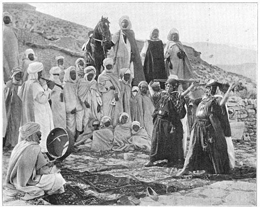 "Danseressen van den stam der Oulad-Nayl" (of Ouled-Nail)